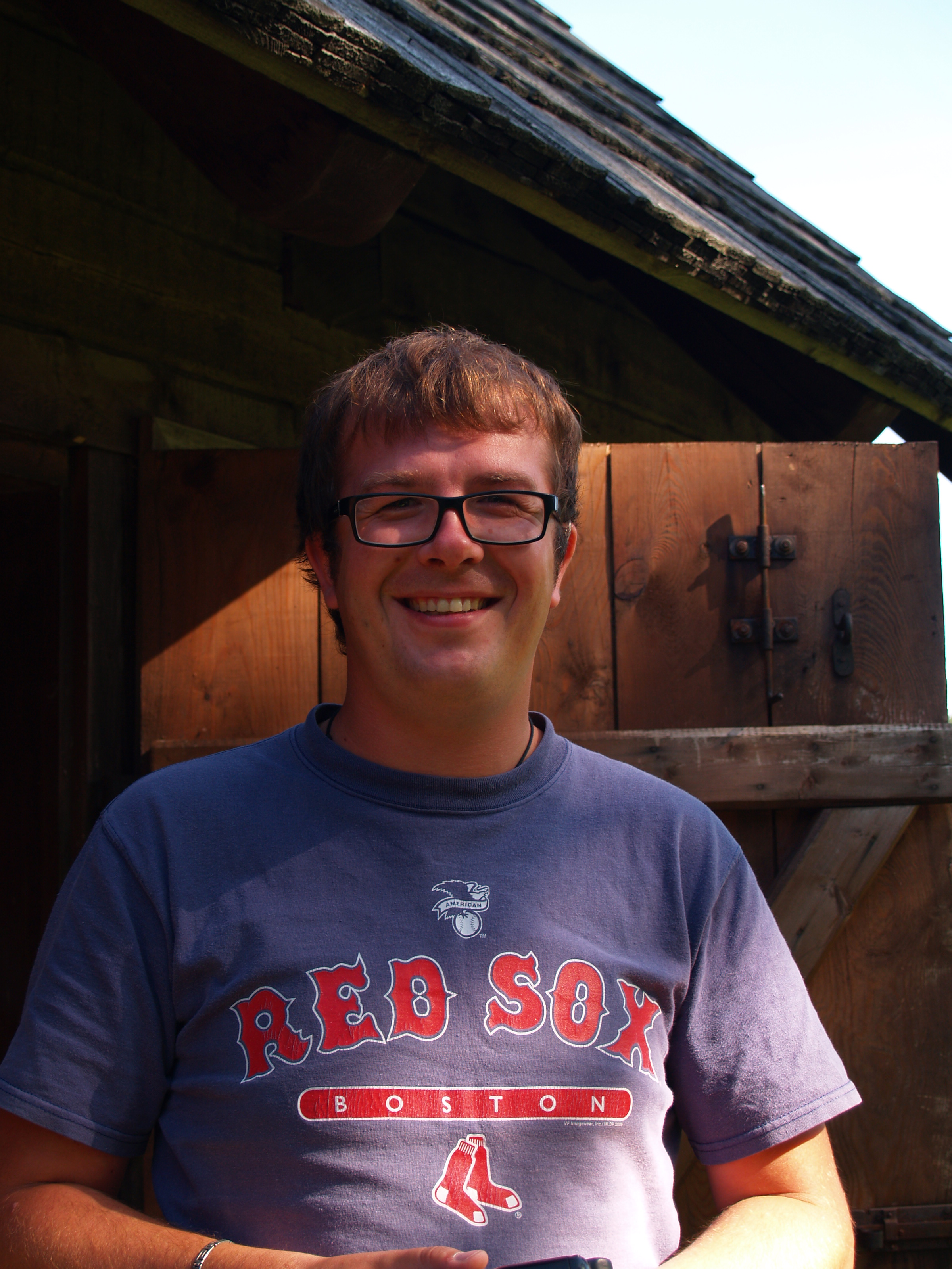 Eesti ajakirjanik Raul Vinni